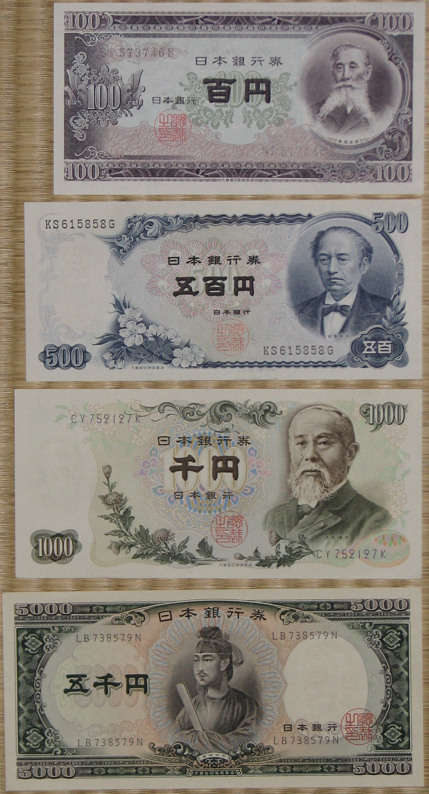 Photo des anciens billets de 100, 500, 1000 et 5000 yens (recto)